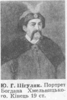 Художник Пигуляк Ю.Г. Портрет Богдана Хмельницкого.